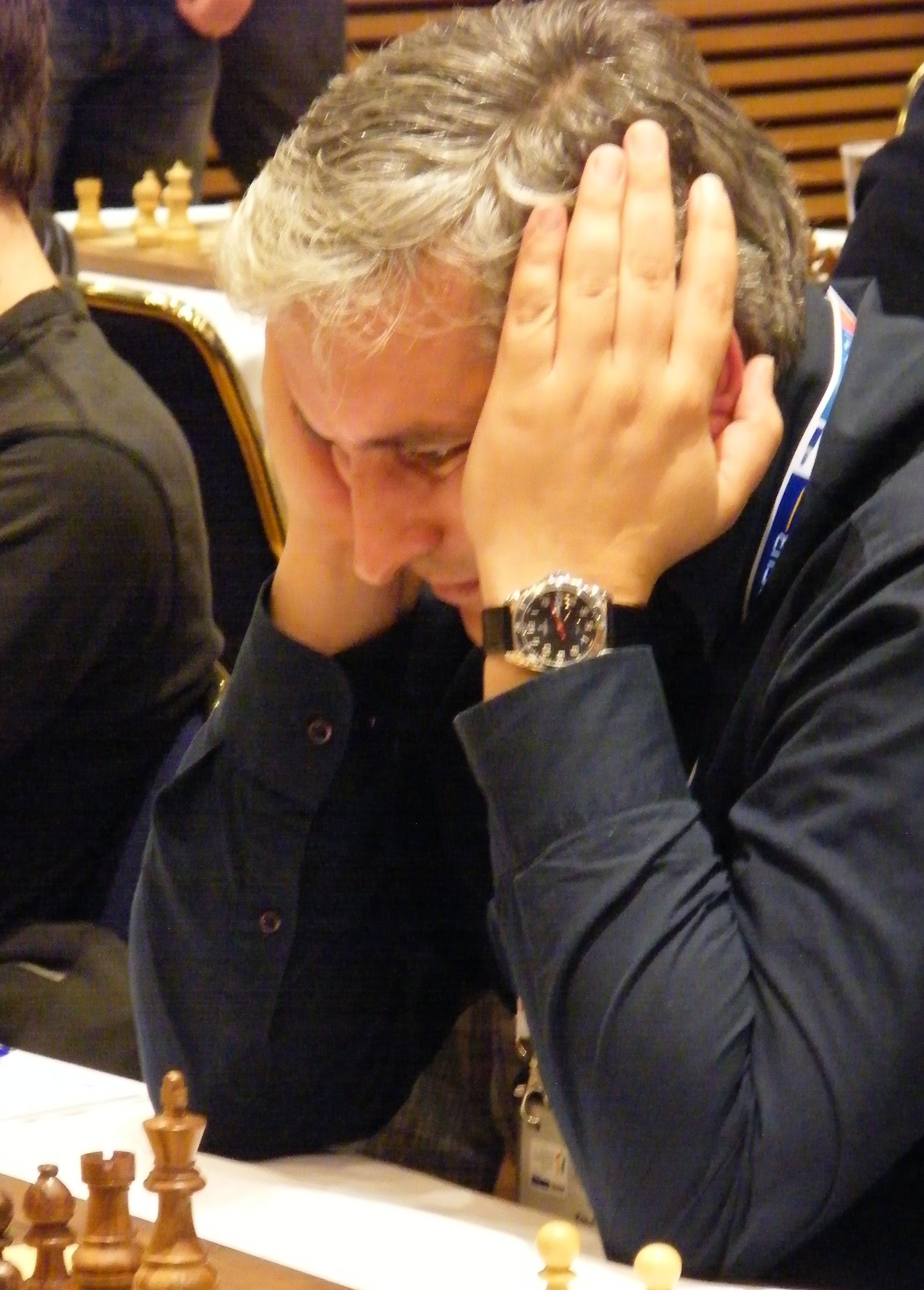 Zdenko Kozul bei der Schacholympiade 2008 in Dresden